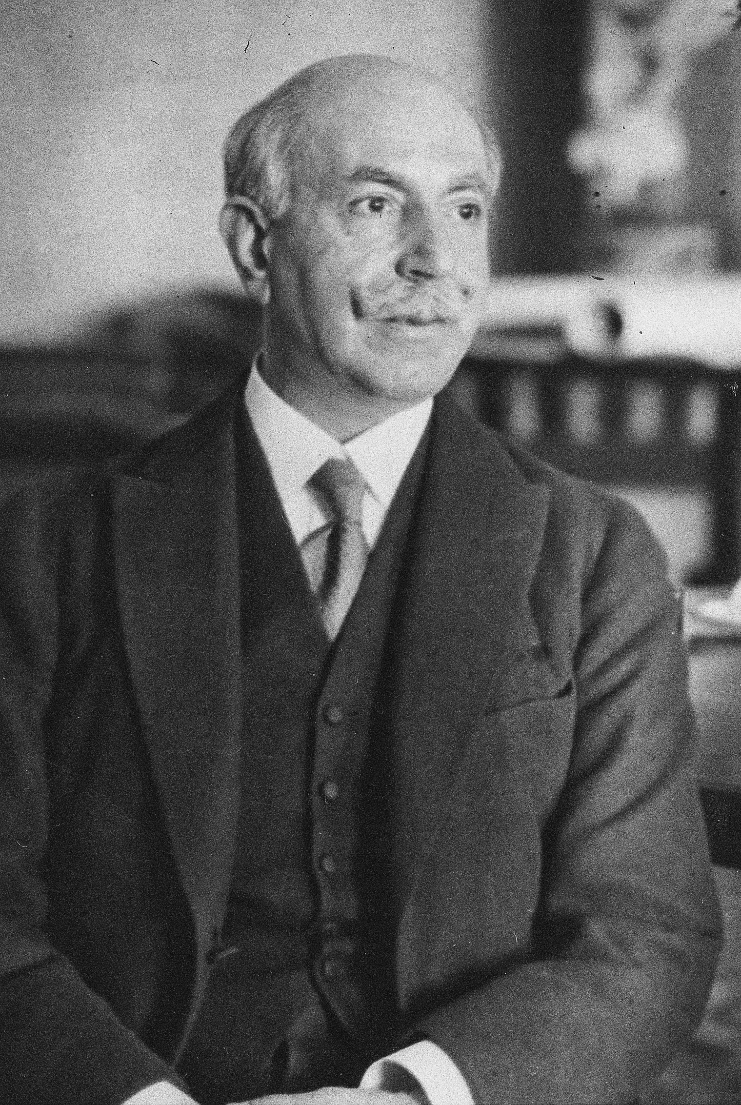 Minister spraw zagranicznych Rumunii podczas wizyty w Polsce, 1929 r.